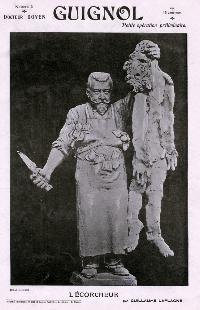 L'écorcheur : docteur Doyen — in Guignol illustré [Paris, ISSN 2129-0857].